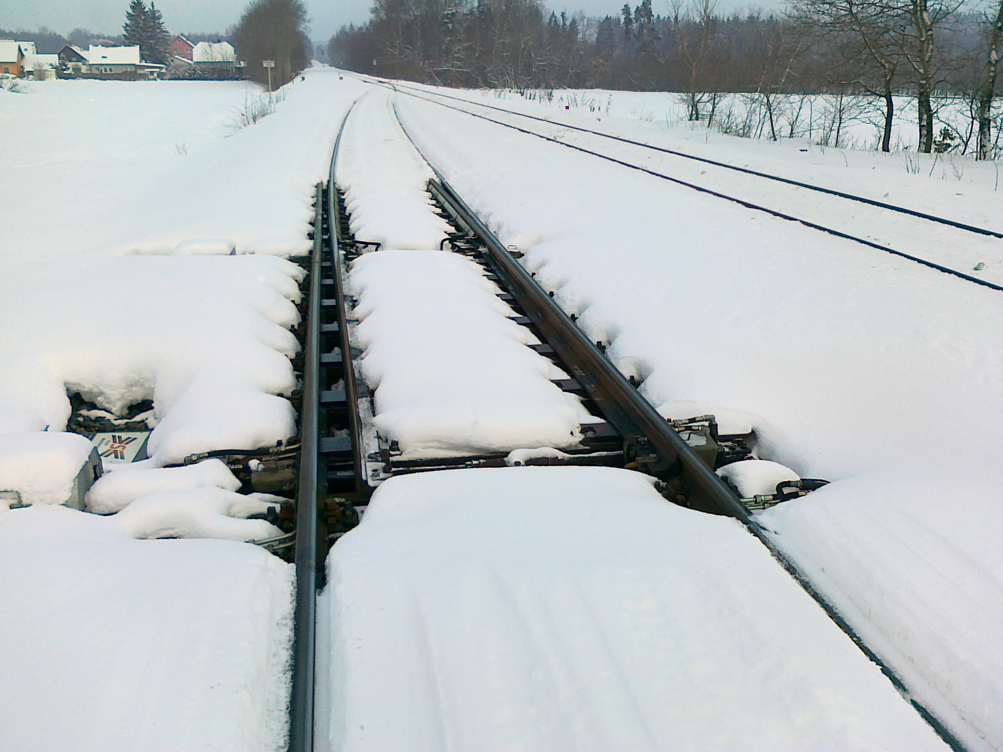 Geothermische Weichenheizung